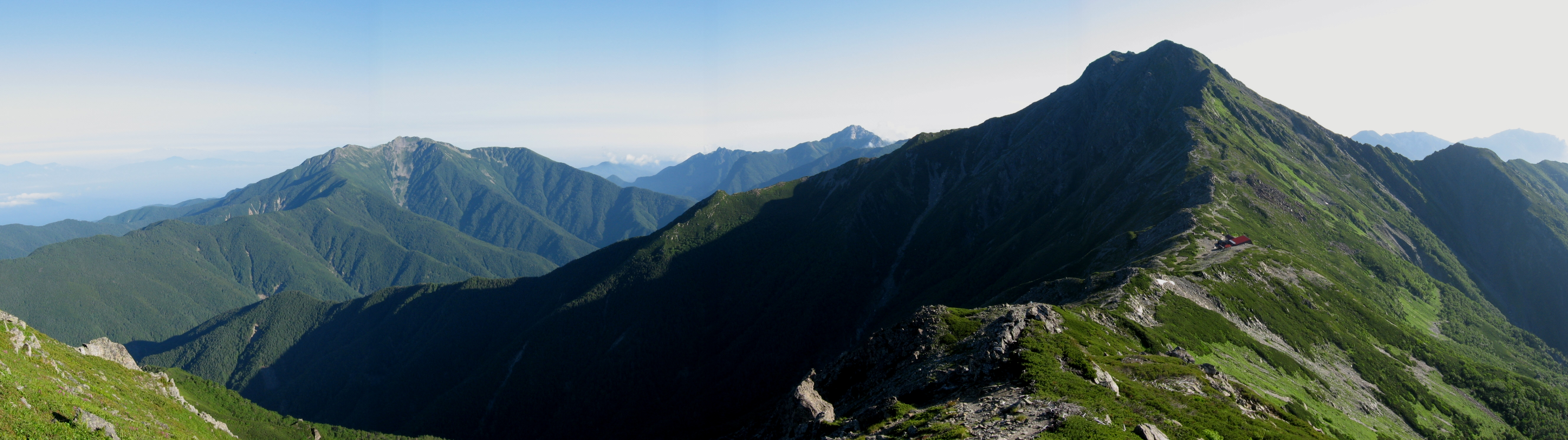 中白根山付近より北岳と仙丈ヶ岳